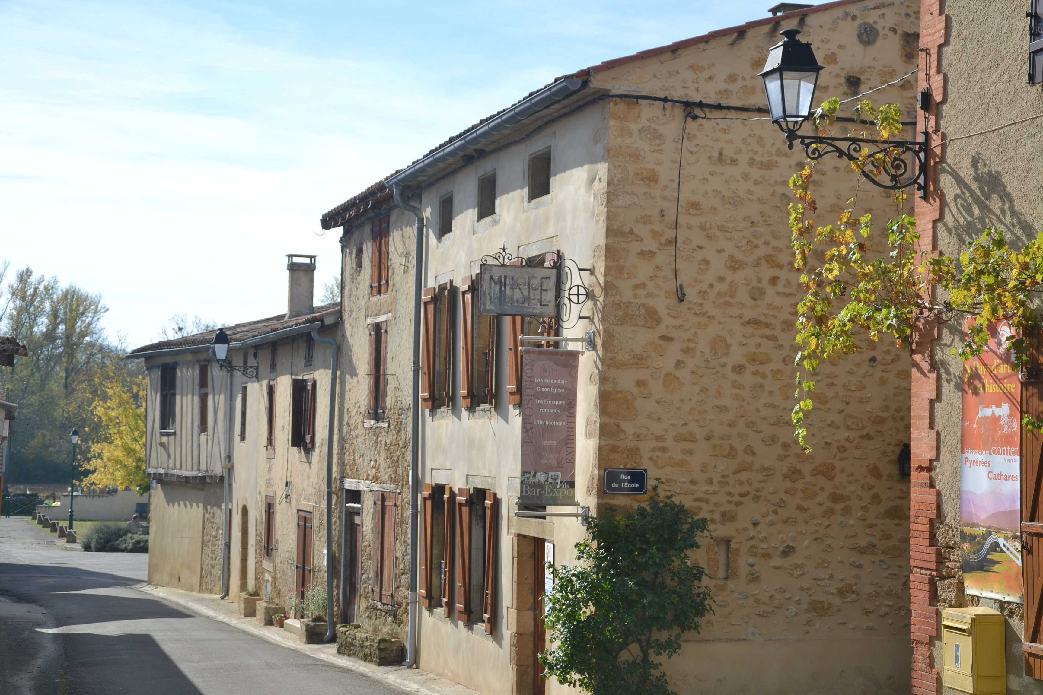 Vals (Ariège, France).